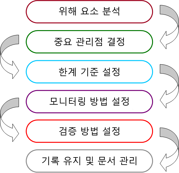 HACCP의 대략적인 7원칙